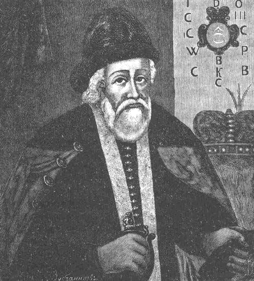 Janusz Ostrogski